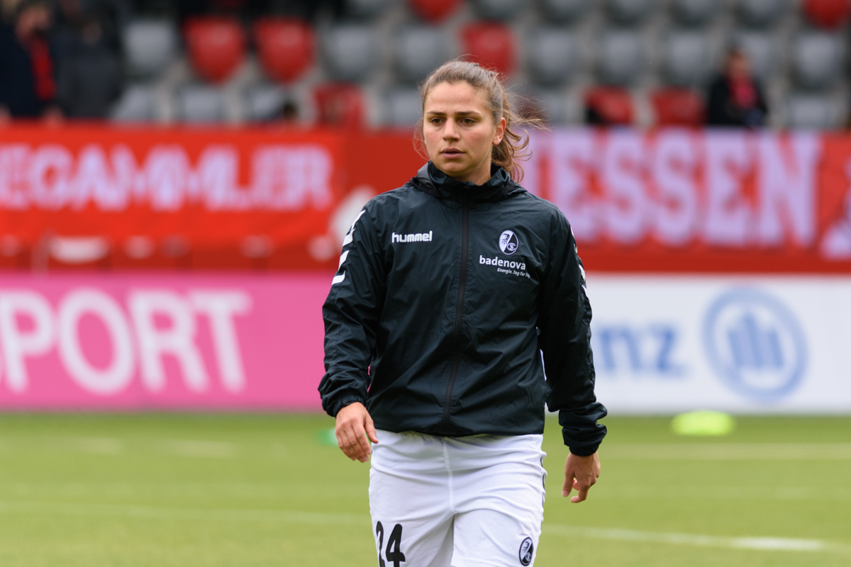 Anja Maike Hegenauer during FC Bayern (women) SC Freiburg (women), May 2019